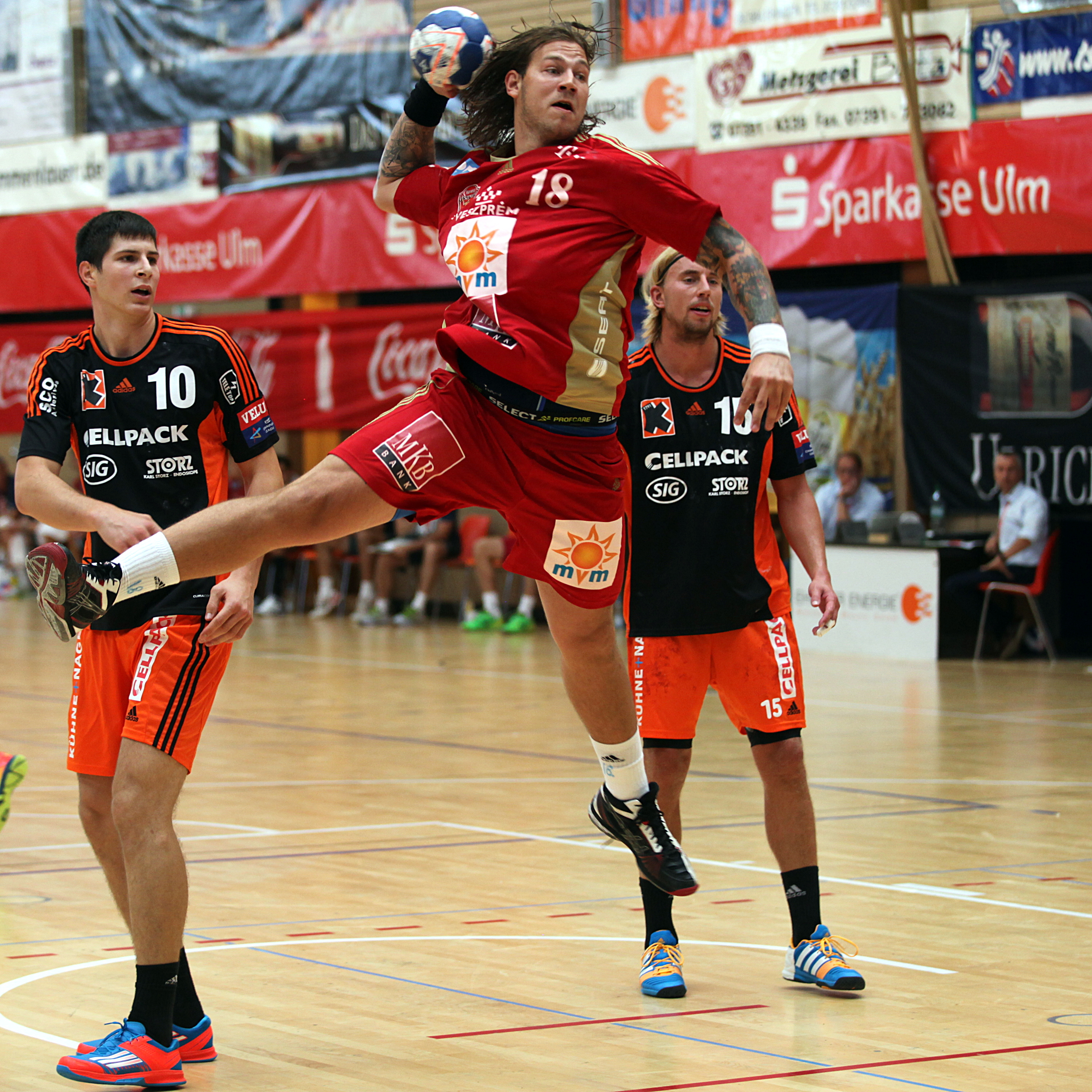 Andreas Nilsson, Handballspieler von KC Veszprém am 16. August 2014 beim Sparkassen-Cup in Ehingen.